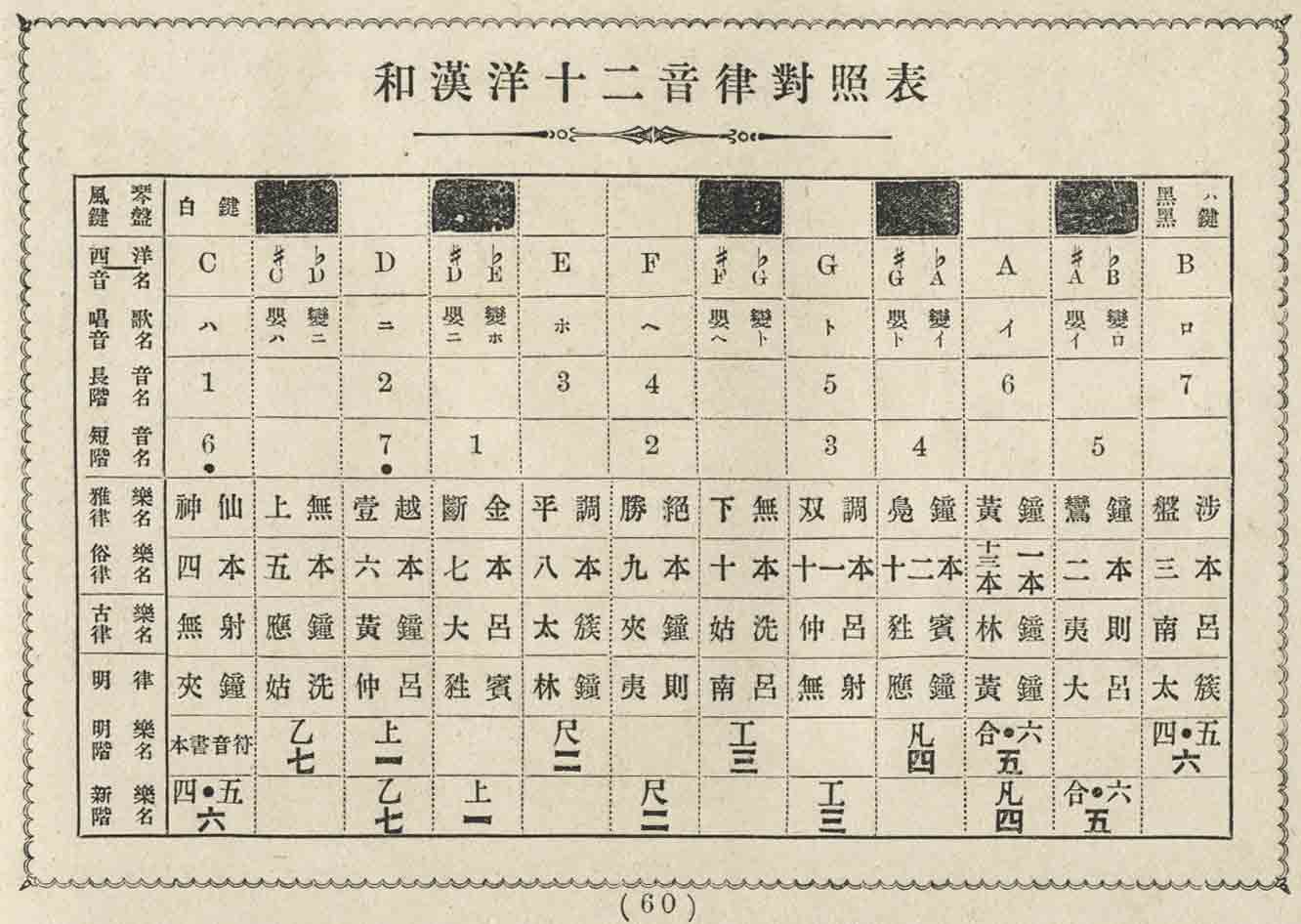 大塚寅蔵著『新案日本数字符 明清楽独まなび』京都：十字屋楽器部発行、明治42年11月発行より。